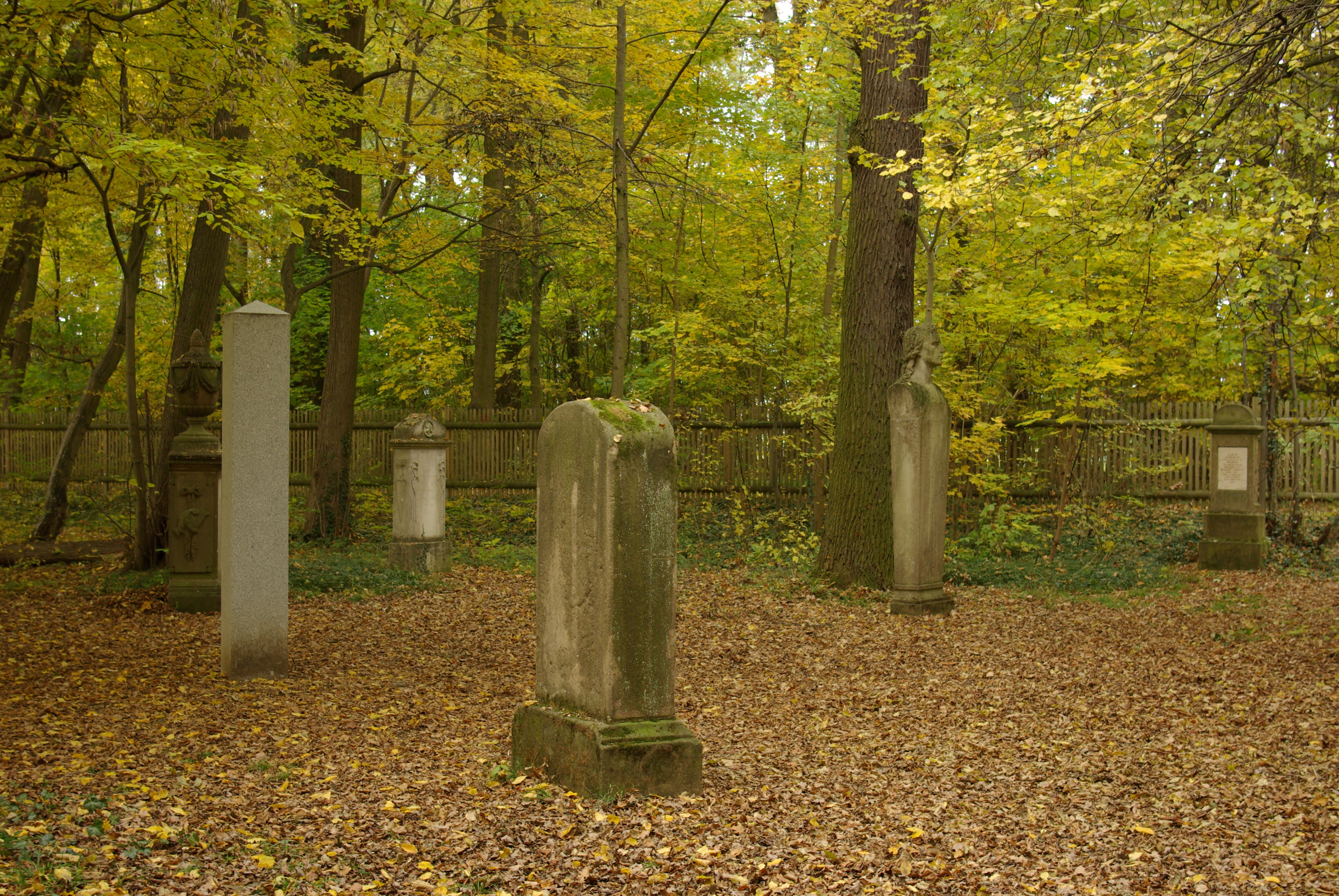 Gedenksteine im Irrhain bei Kraftshof. Dieser Teil der Anlage wurde als Scheinfriedhof gestaltet.